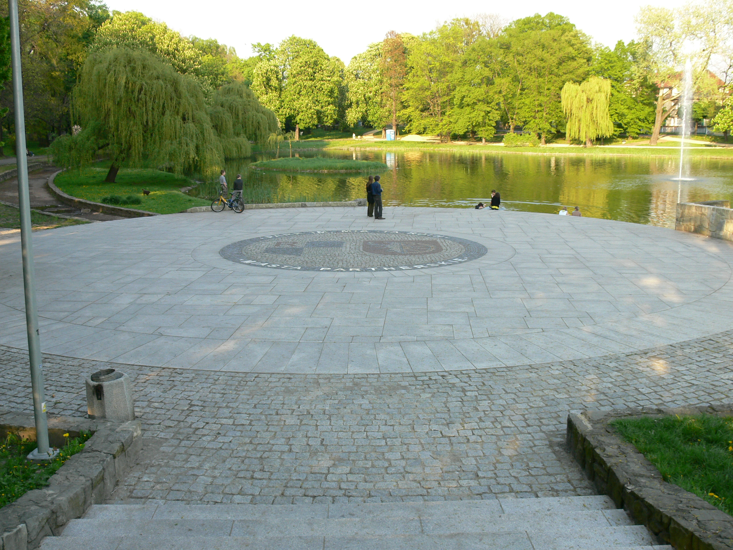 Racibórz — Park im. Miasta Roth: widok na plac, staw i fontanny